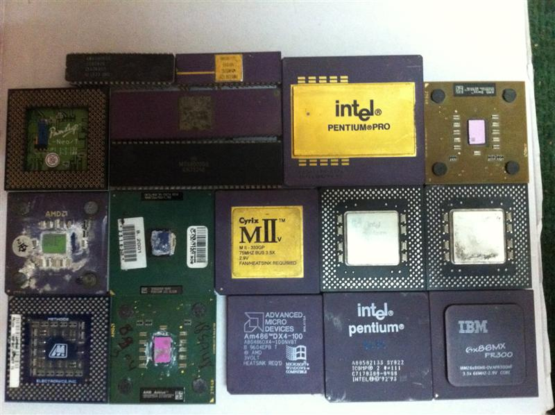 Template:Wiki CPU